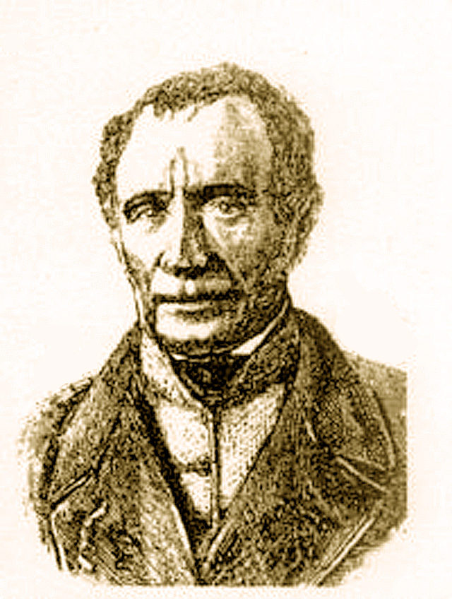 Henri -Louis Pernod 1776-1851, fondateur d'une distillerie d'absinthe à Pontarlier